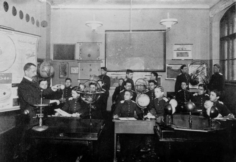 Blatt 6 Im Unterricht Nach der Morgenandacht, die sich unmittelbar an den Morgenappell anschließt, strömt die Kadettenschar dem Lehrgebäude zu, das sie für die Dauer von fünf Stunden aufnehmen soll. Das Unterrichtsprogramm entspricht dem der Realgymnasien. In weitgehender Weise ist für die Benutzung aller modernen Lehrmittel gesorgt, und hier sei besonders noch auf das reich ausgestattete physikalische und chemische Kabinett, sowie die Räume für den geographischen Anschauungsunterricht hingewiesen.